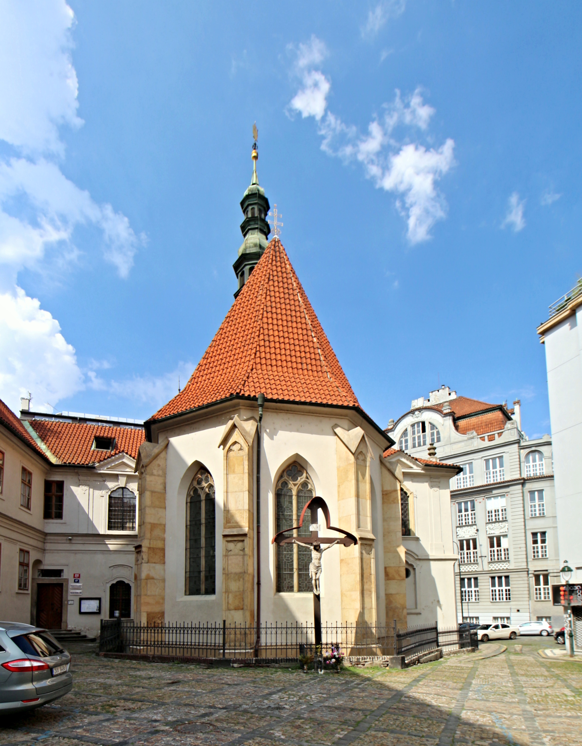 Kostel sv. Vojtěcha, Praha-Nové Město